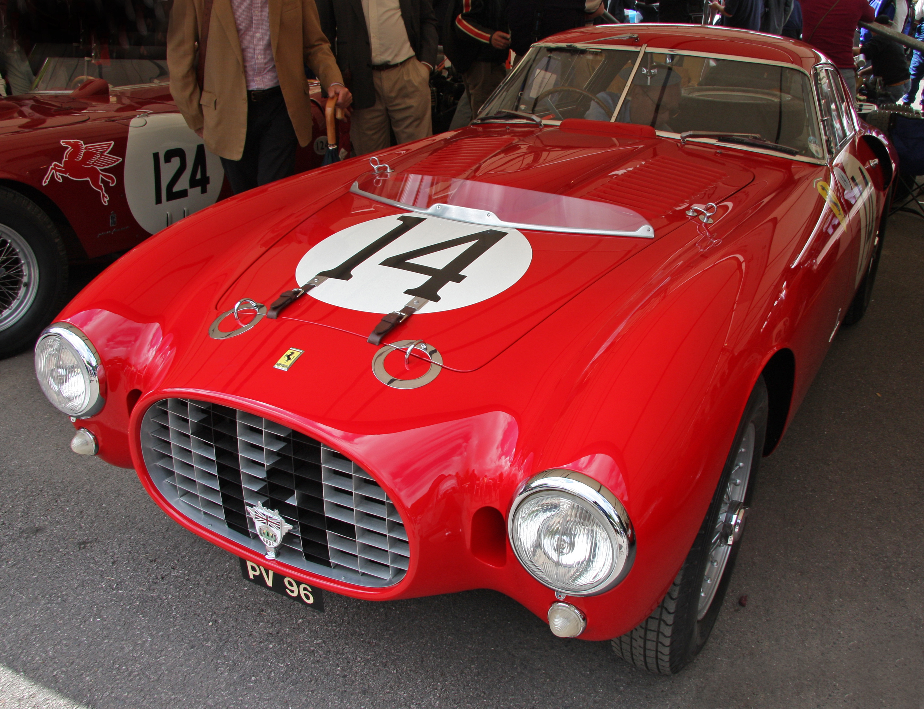 Built 1953. 4.5 litre V12